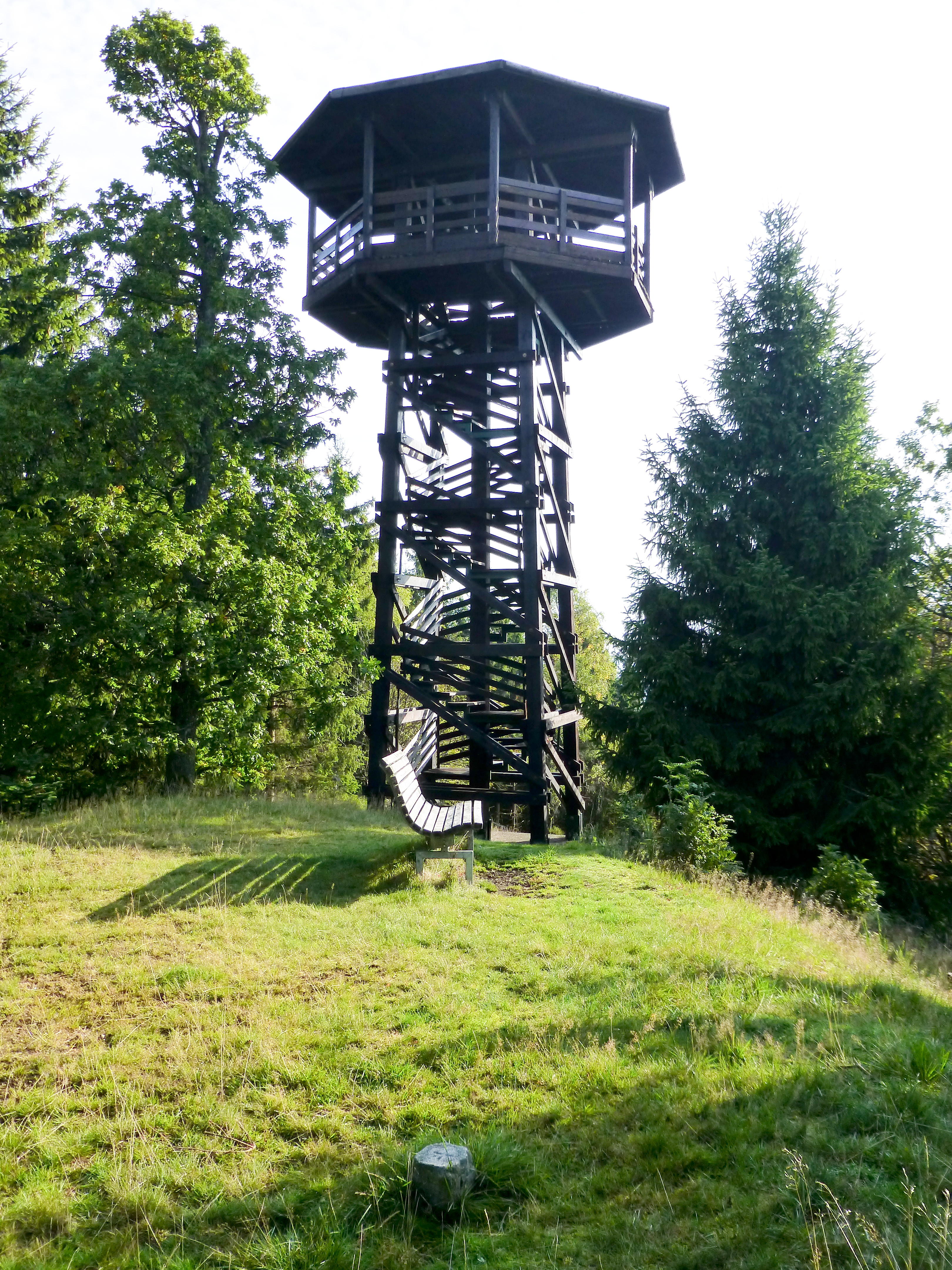 Heidekopfturm; Westansicht; im Vordergrund der Gipfelstein des Heidekopfs